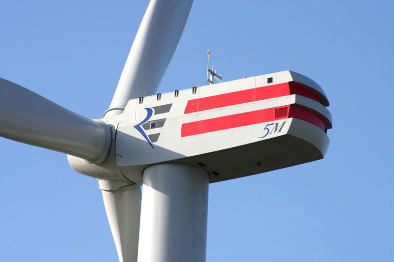 Eine von fünf Repower 5M Windkraftanlagen im Windpark Büttel. Die Anlagen haben eine Nabenhöhe von 120m und einen Rotordurchmesser von 126m. Die Nennleistung beträgt 5000 kW